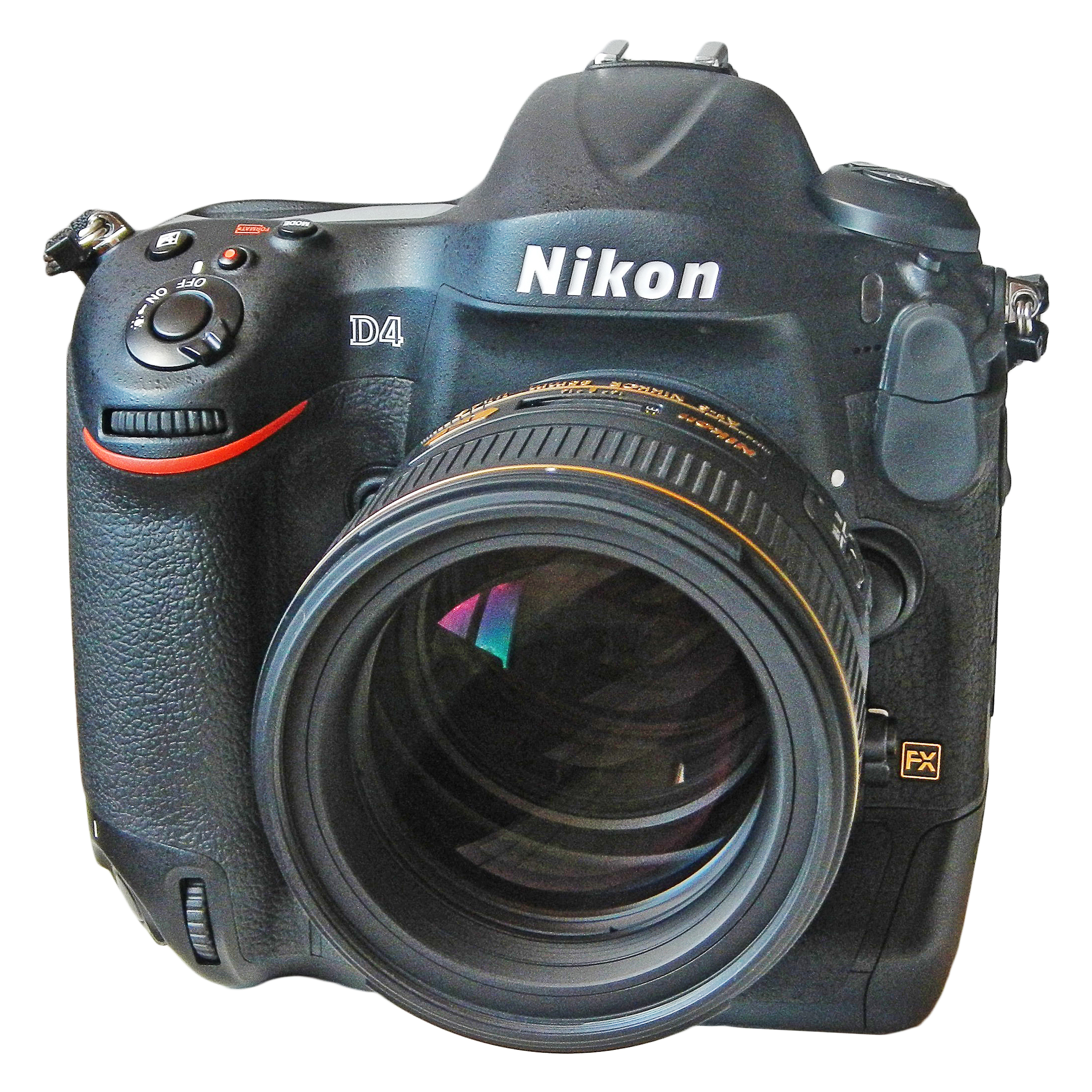 Nikon D4 + AF-S 85mm f/1.4